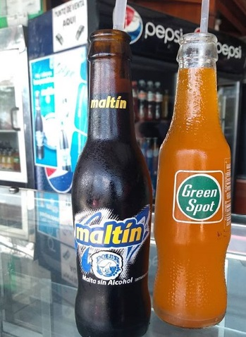 Maltin polar - green spot. La Victoria, Venezuela